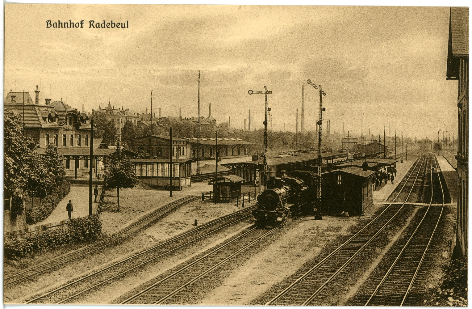 Radebeul; Bahnhof mit Lokomotive This postcard is from publisher Brück & Sohn in Meißen ( postcard has a unique number 17976 and is available in a higher resolution at the publisher. This images was uploaded in a cooperation project between Wikipedians and the publisher.